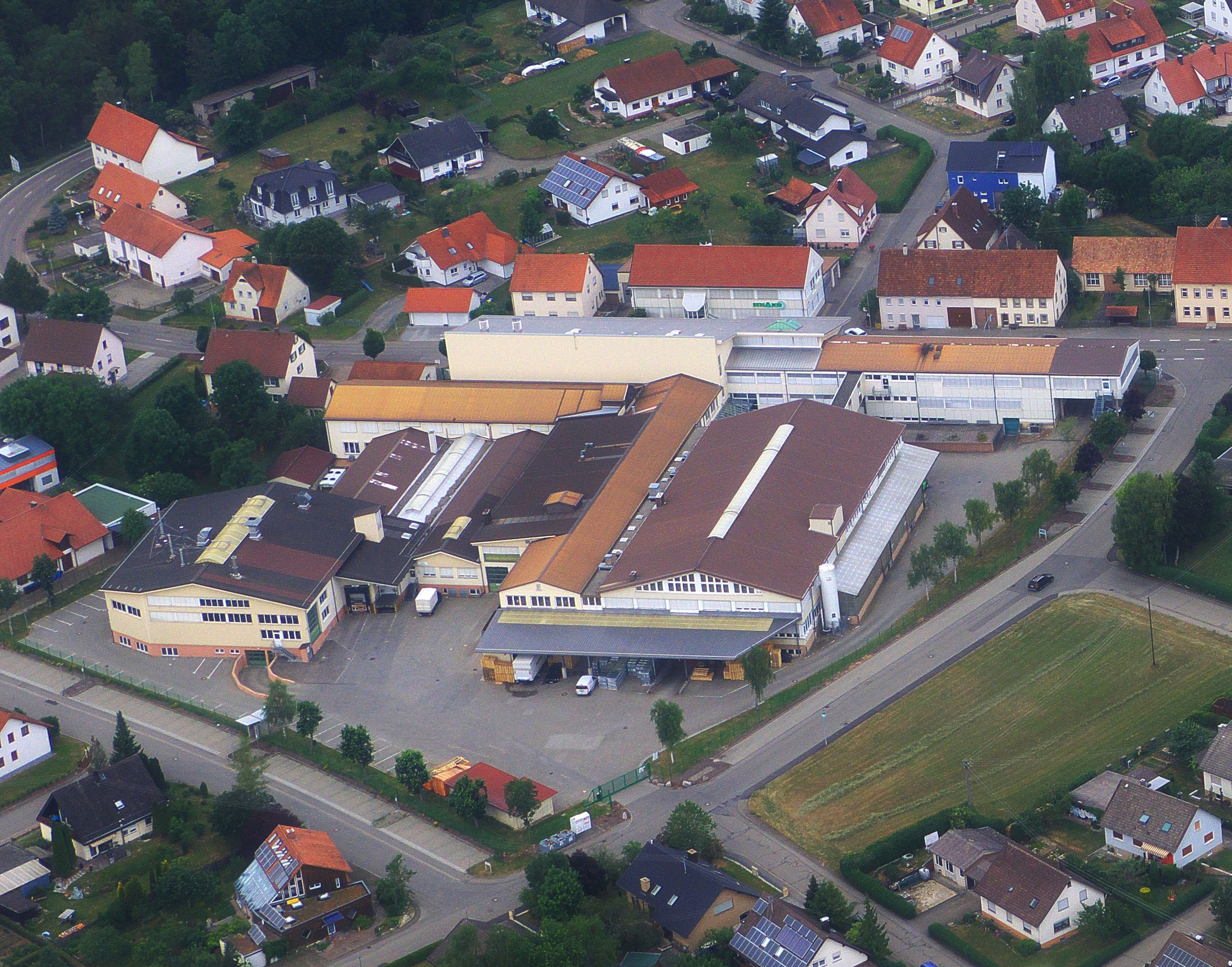 Diese Luftaufnahme zeigt die SCHAKO KG von oben. Zu sehen sind die Produktion sowie das Verwaltungsgebäude. Das Schulungsgebäude befindet sich auf der gegenüberliegenden Straßenseite und trägt das grüne SCHAKO Logo.